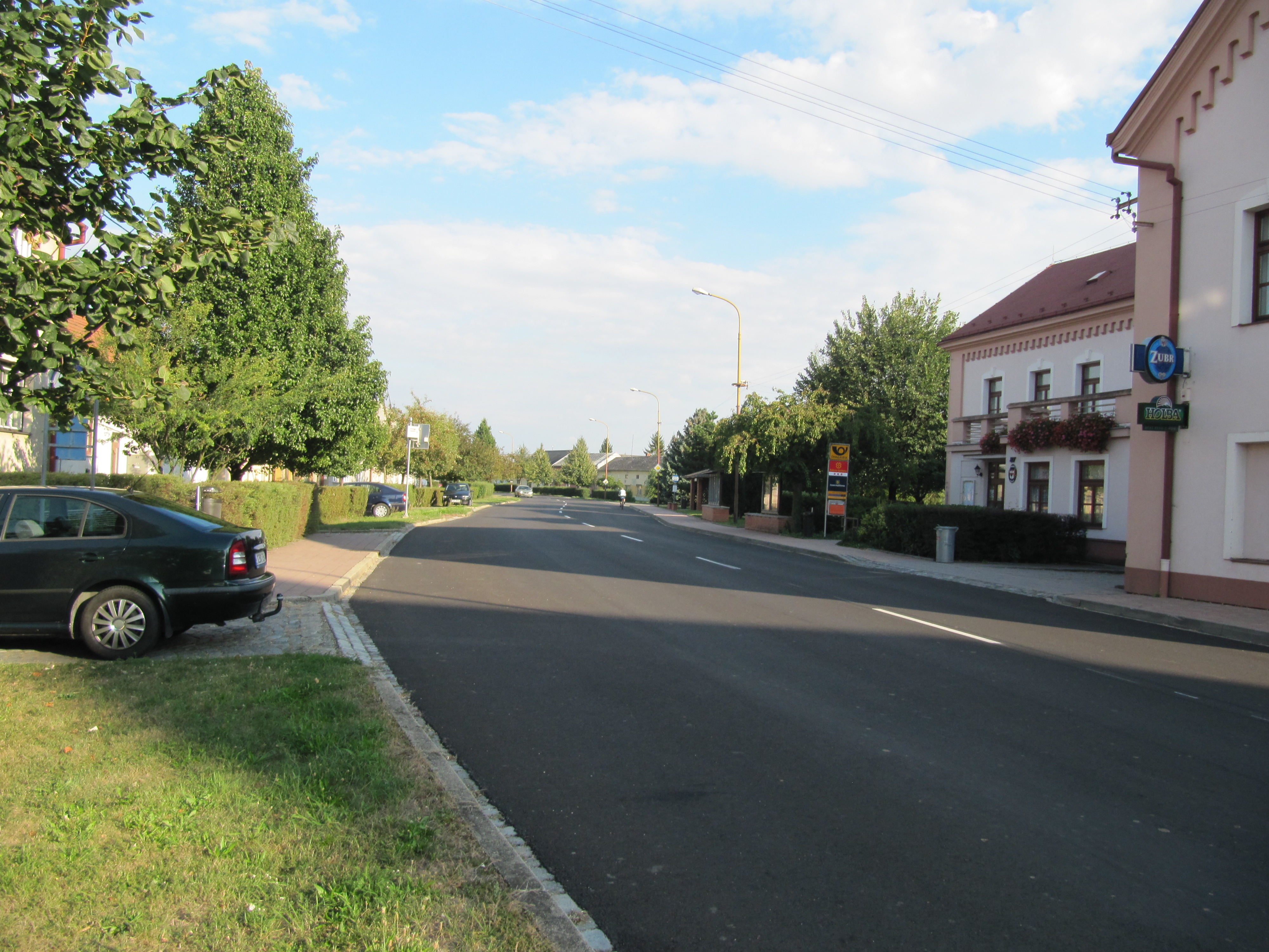 Břest